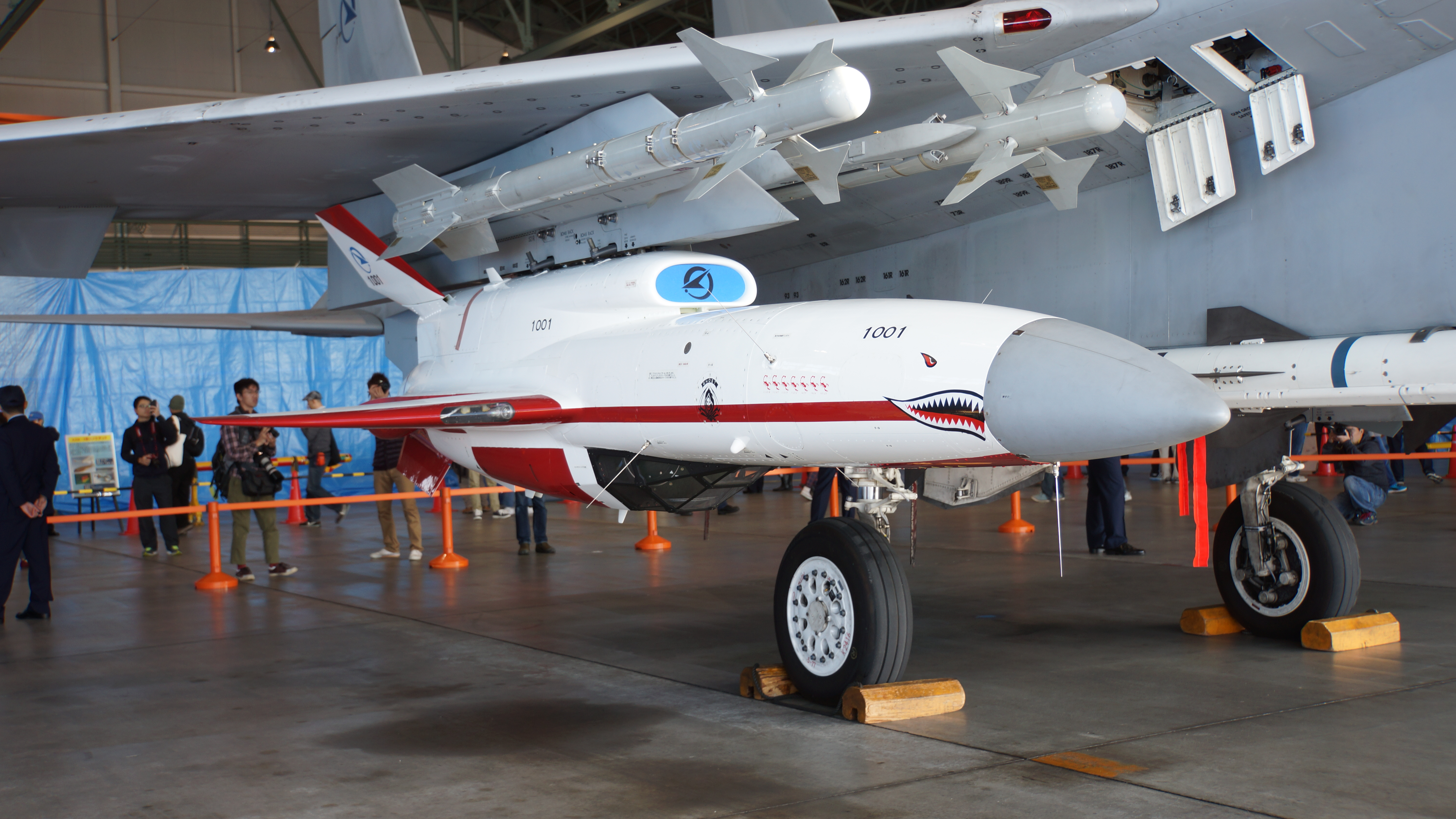 航空自衛隊 無人機研究システム 無人機（1001号機） 及び90式空対空誘導弾（AAM-3）。2016年10月30日 岐阜基地にて。